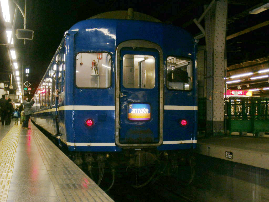 最後尾です。